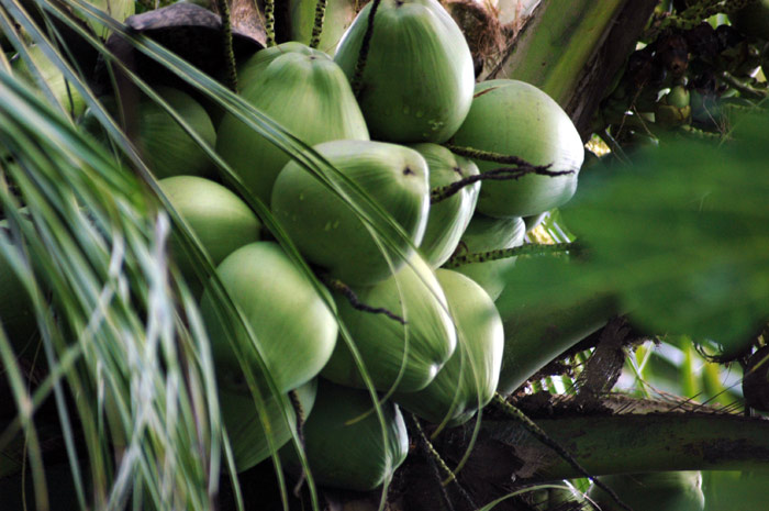 ഇളനീർ കുല